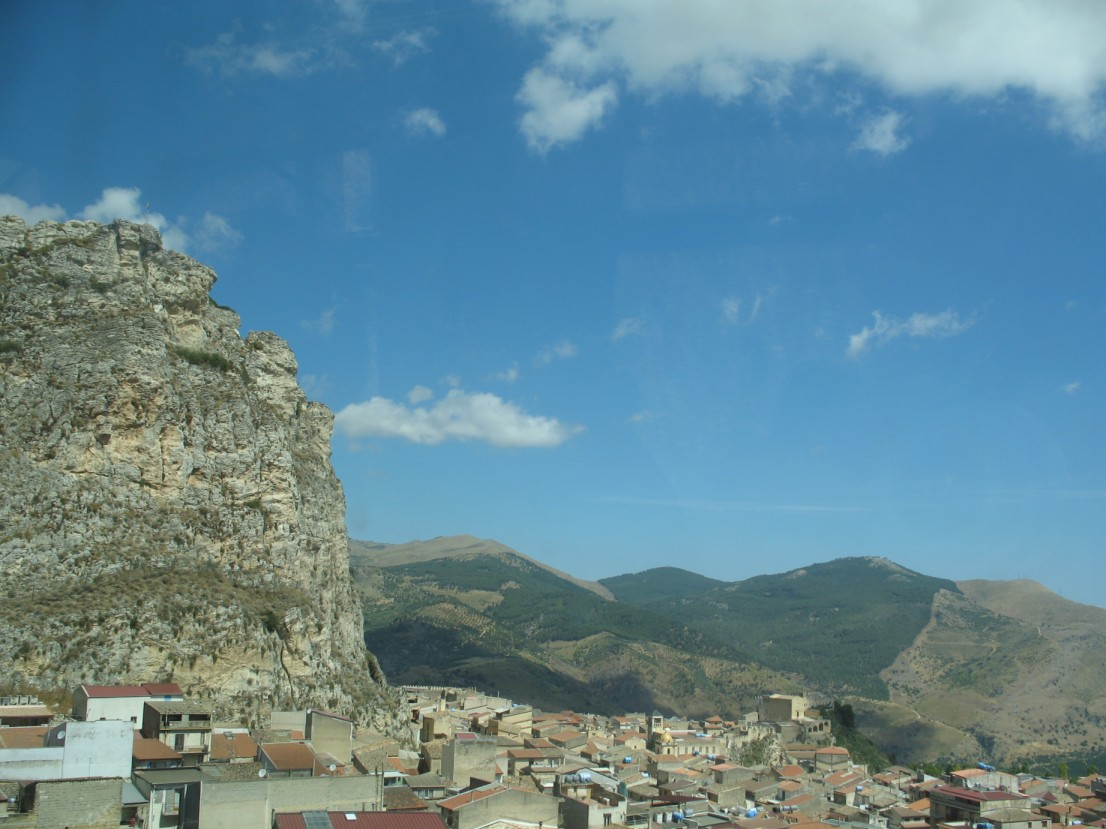 Krajina u městečka Marineo na cestě z Palerma do Corleone